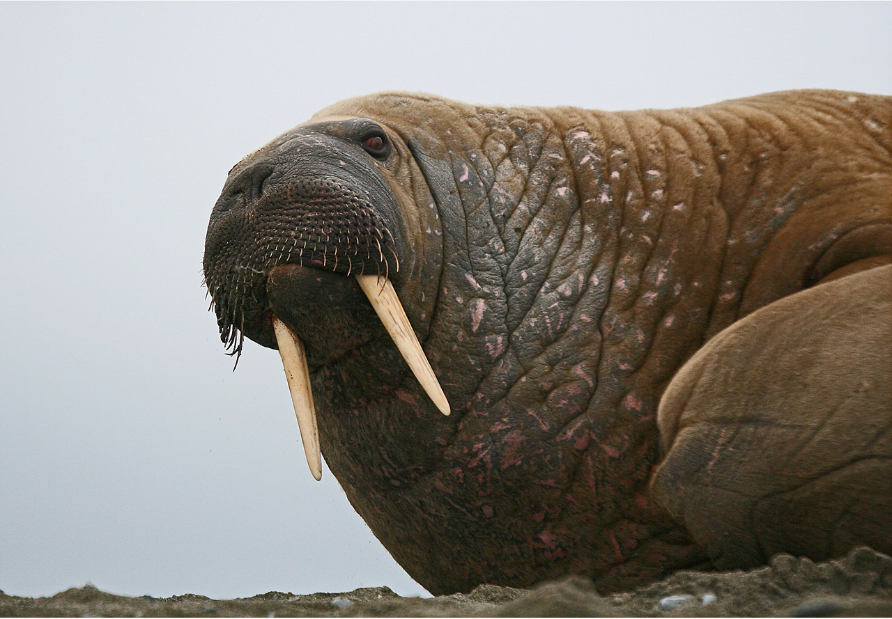 Walrossbulle (Ododbenus rosmarus) auf Spitzbergen